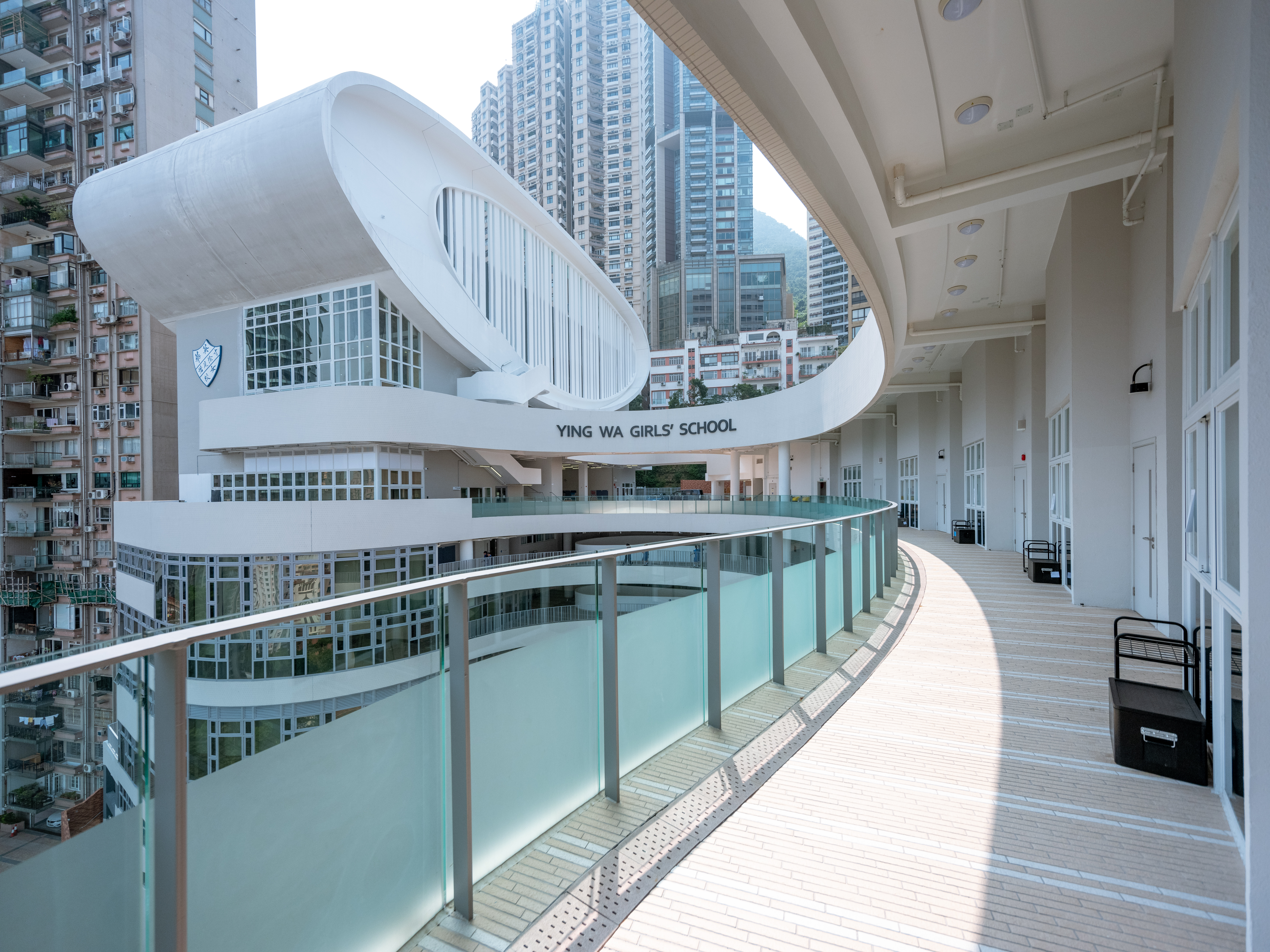 英華女學校新校舍